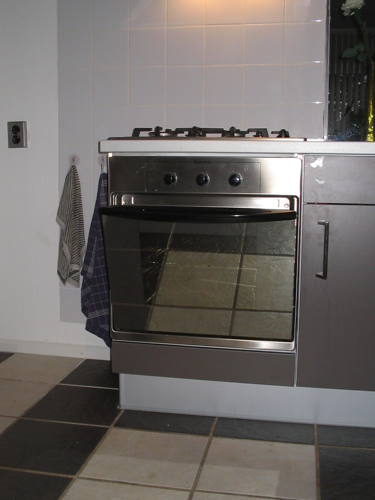 huishoudelijke oven in mijn keuken